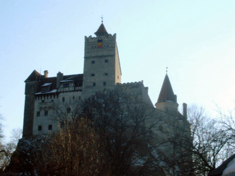 Schloss Bran (Törzburg)